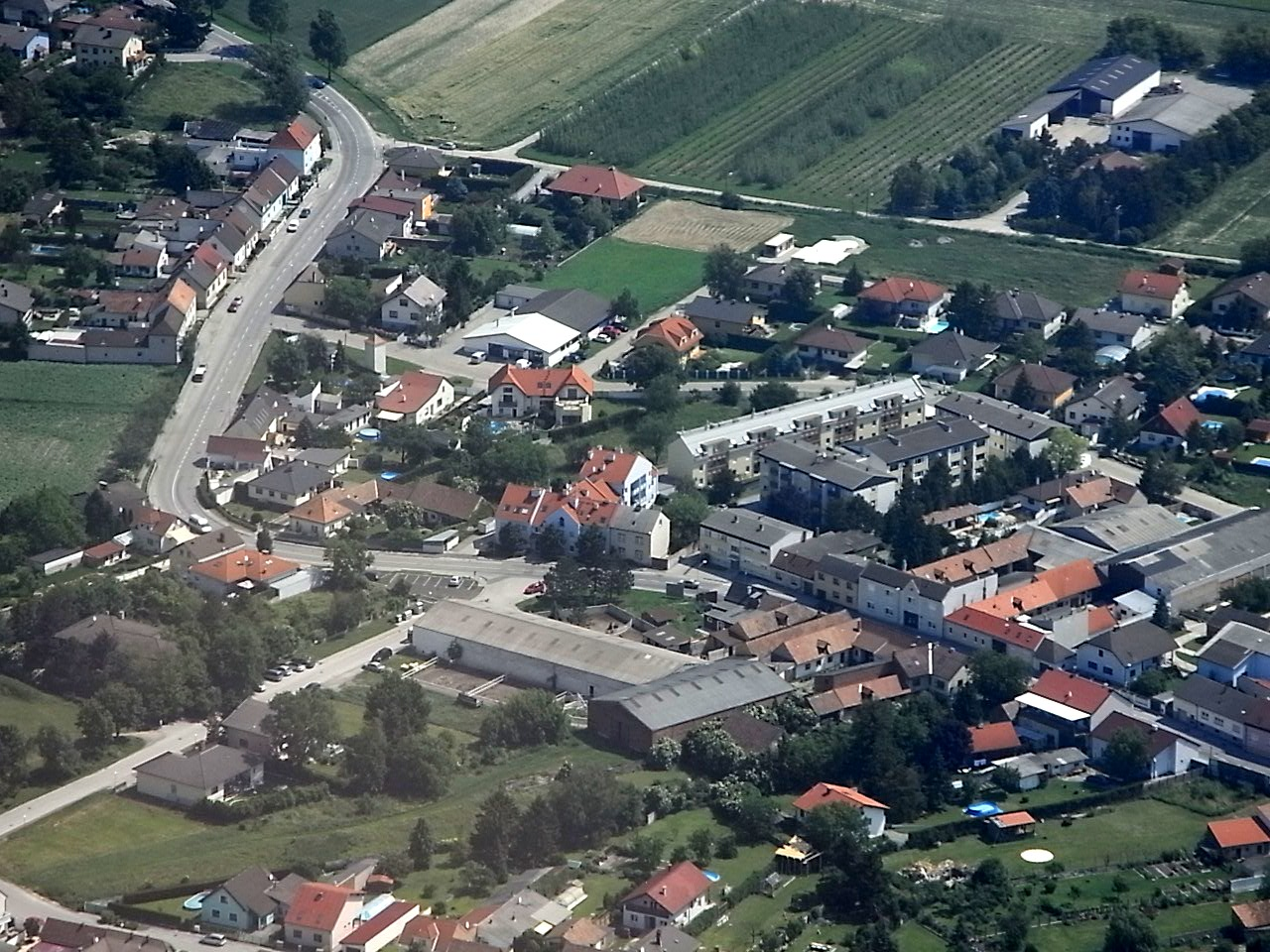 El-aera vido al Enzersdorf ĉe Fischa (Aŭstrio)